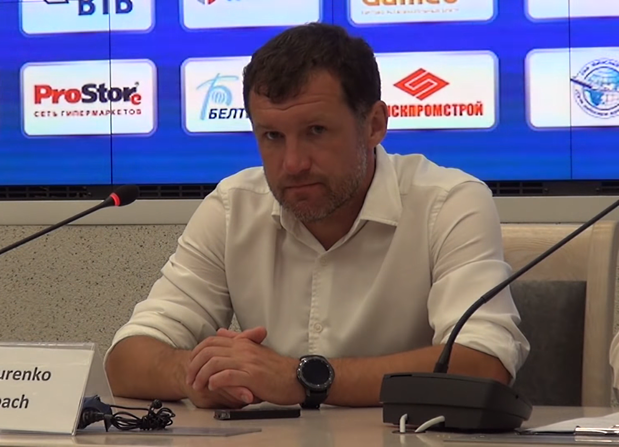 Сергей Гуренко на пресс-конференции в 2018 году